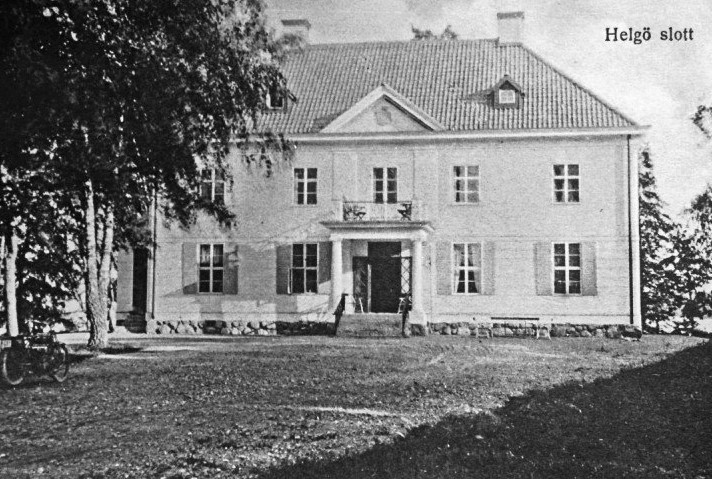 Hälgö säteri (Helgö slott)